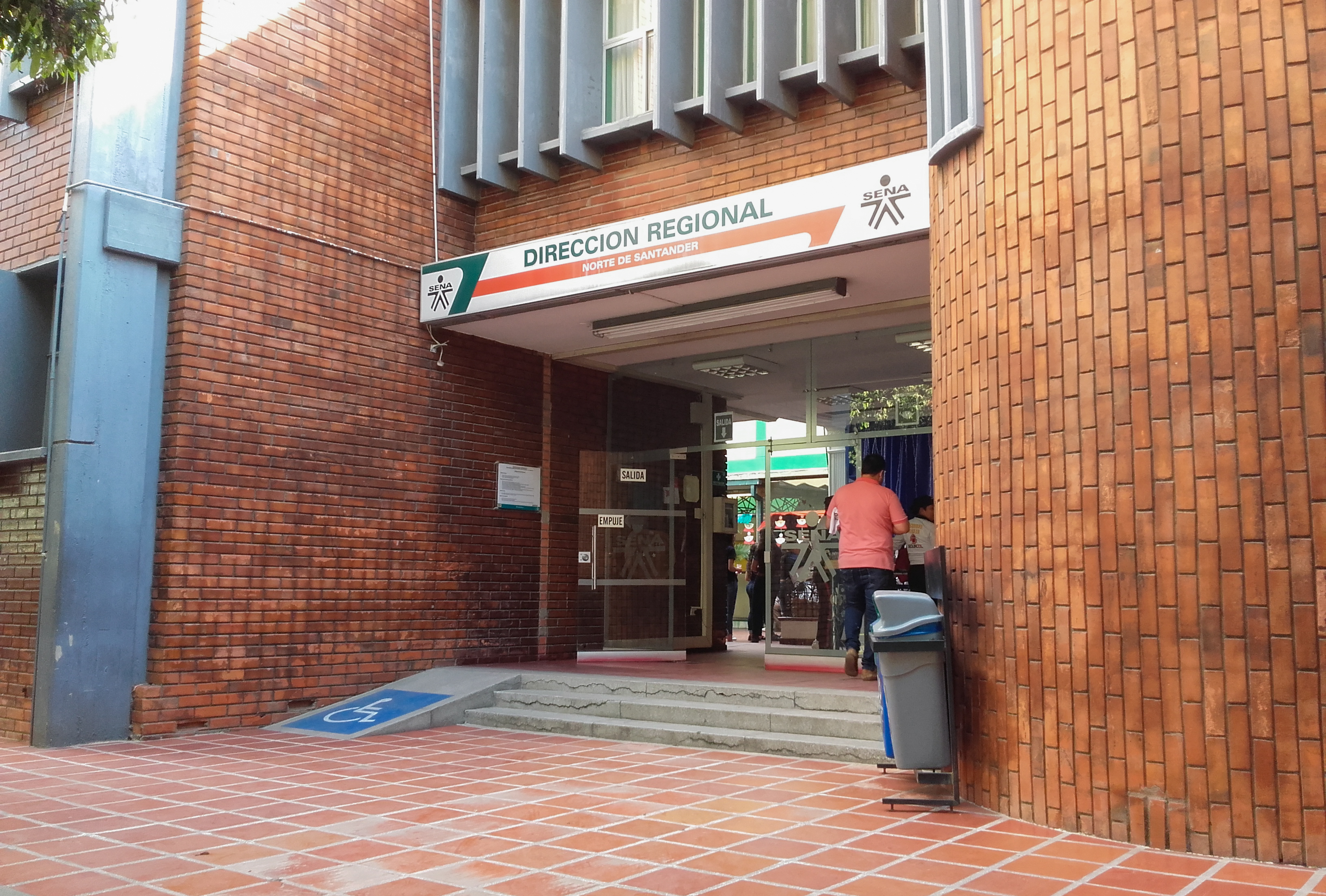 Sena, Regional Norte de Santander.